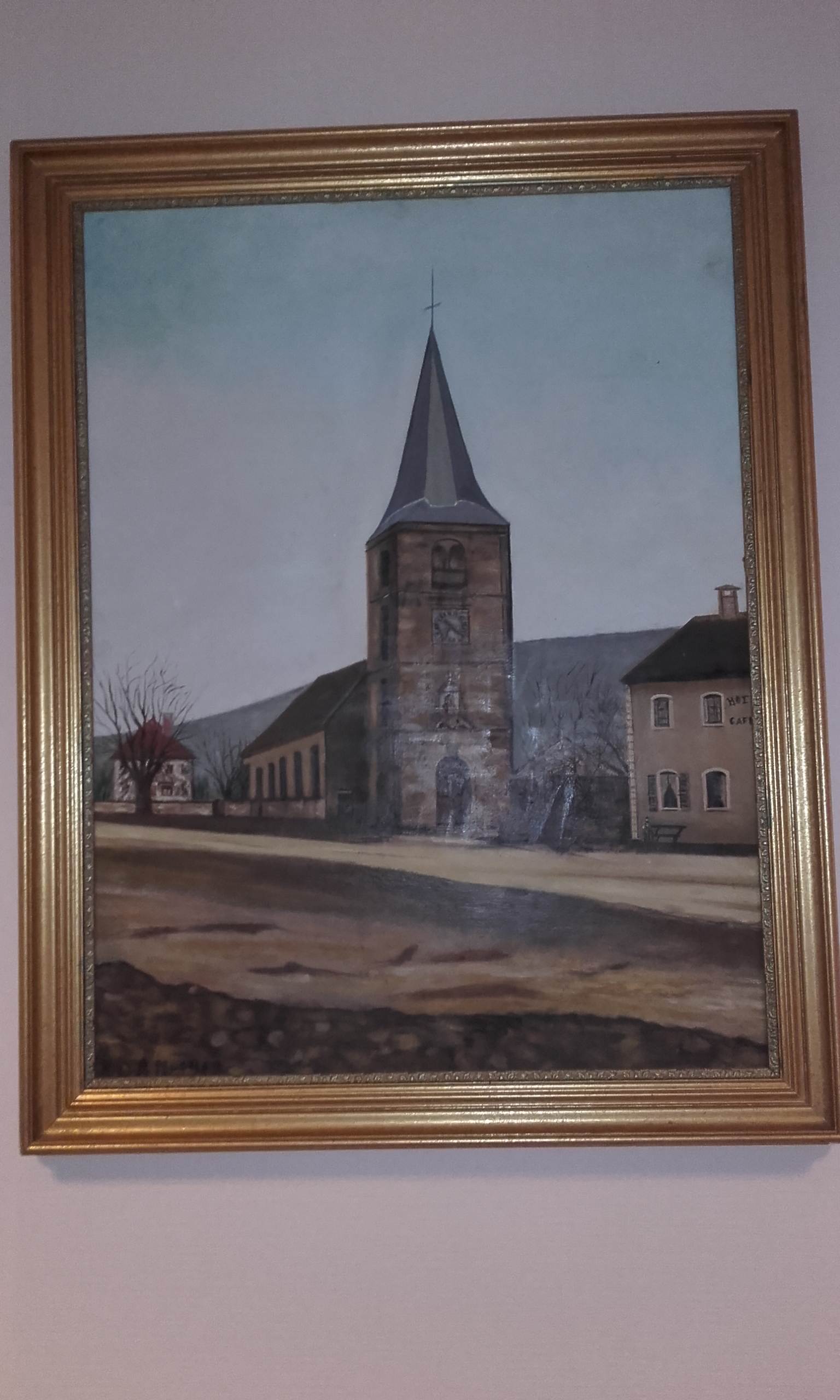 Vosges, Saulxures-sur-Moselotte